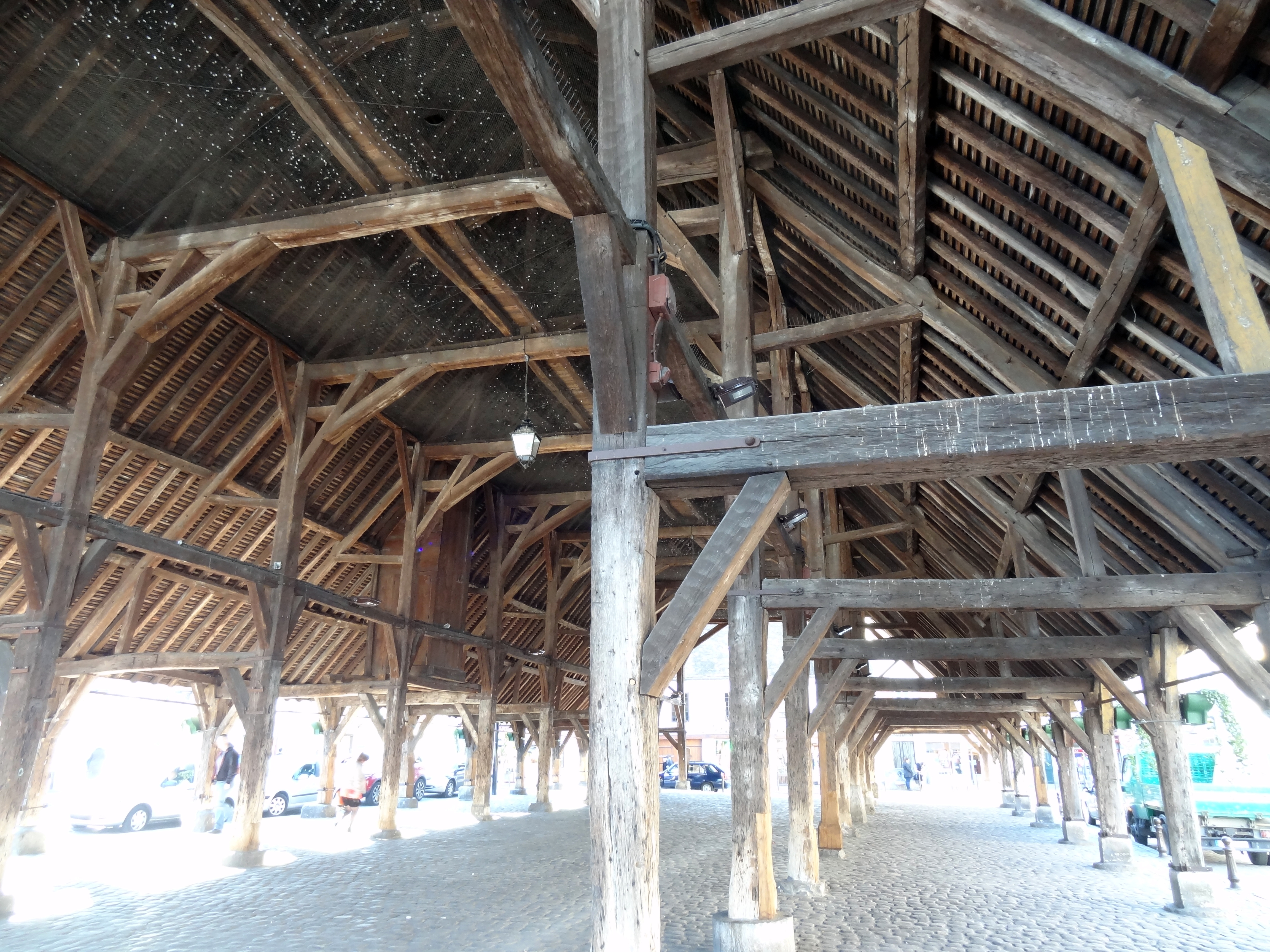 Halles d'Arpajon, vue d’ensemble de l’intérieur, vers la sortie coté Ouest.